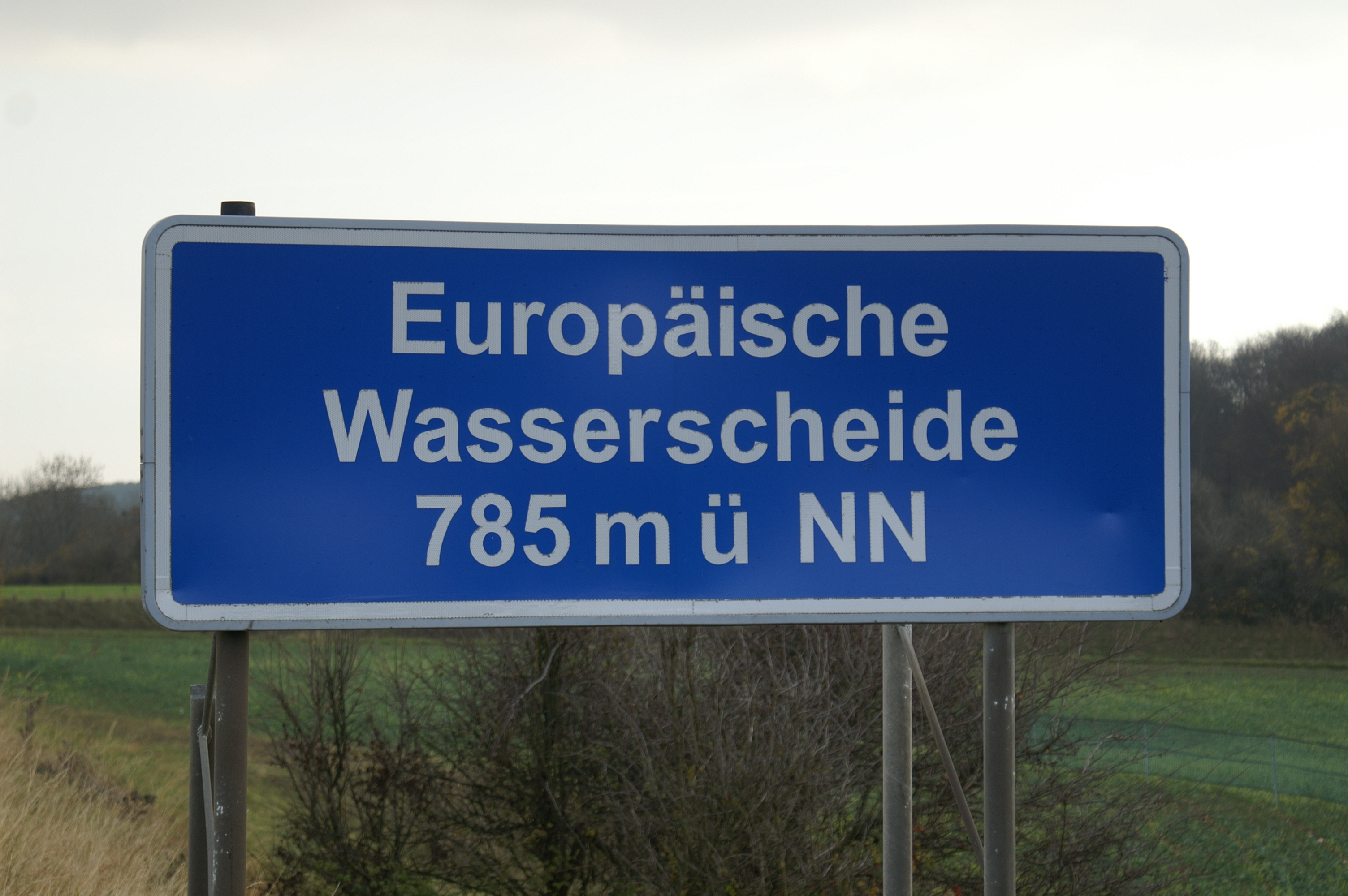 Die Europäische Wasserscheide auf der Albhochfläche bei Hohenstadt im Landkreis Göppingen